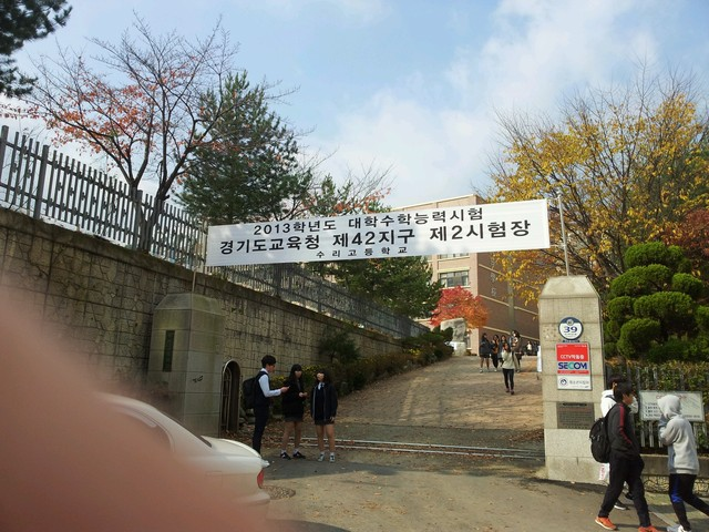 수리고등학교 2013 수능 전